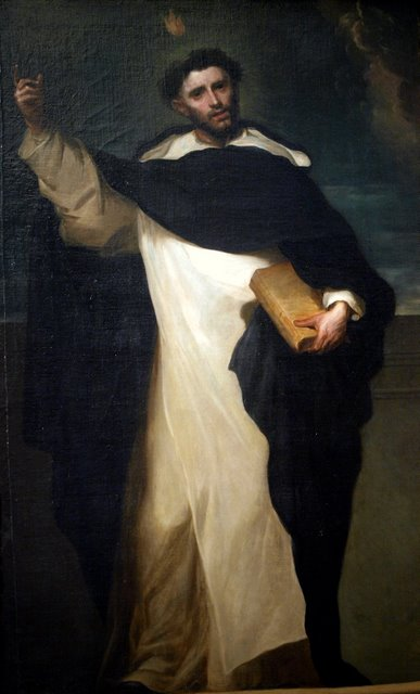 Saint Vincent Ferrer